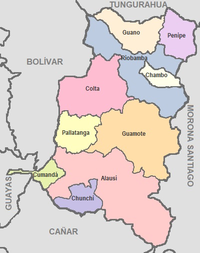 Cantones de la Provincia de Chimborazo, Qcuador